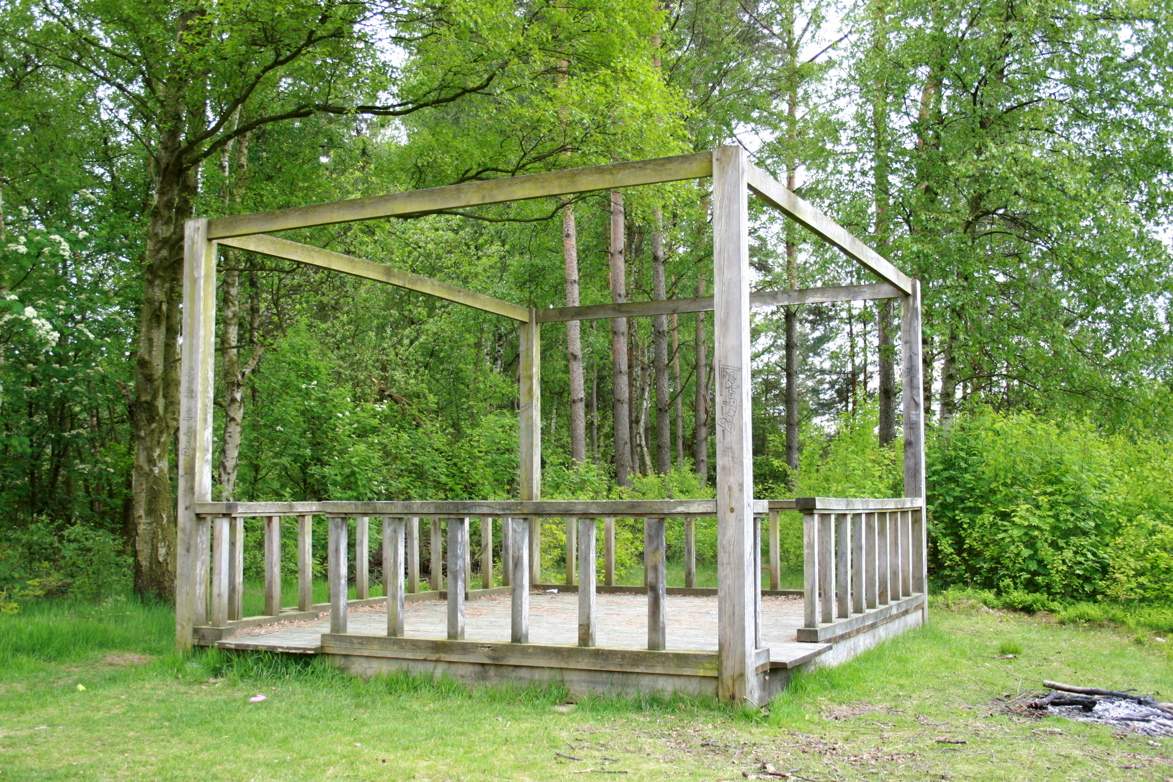 „Eiche tätowiert“, Skulptur von Silke Schatz im Projekt Kunst-Landschaft des Kunstvereins Springhornhof in Neuenkirchen (Lüneburger Heide)